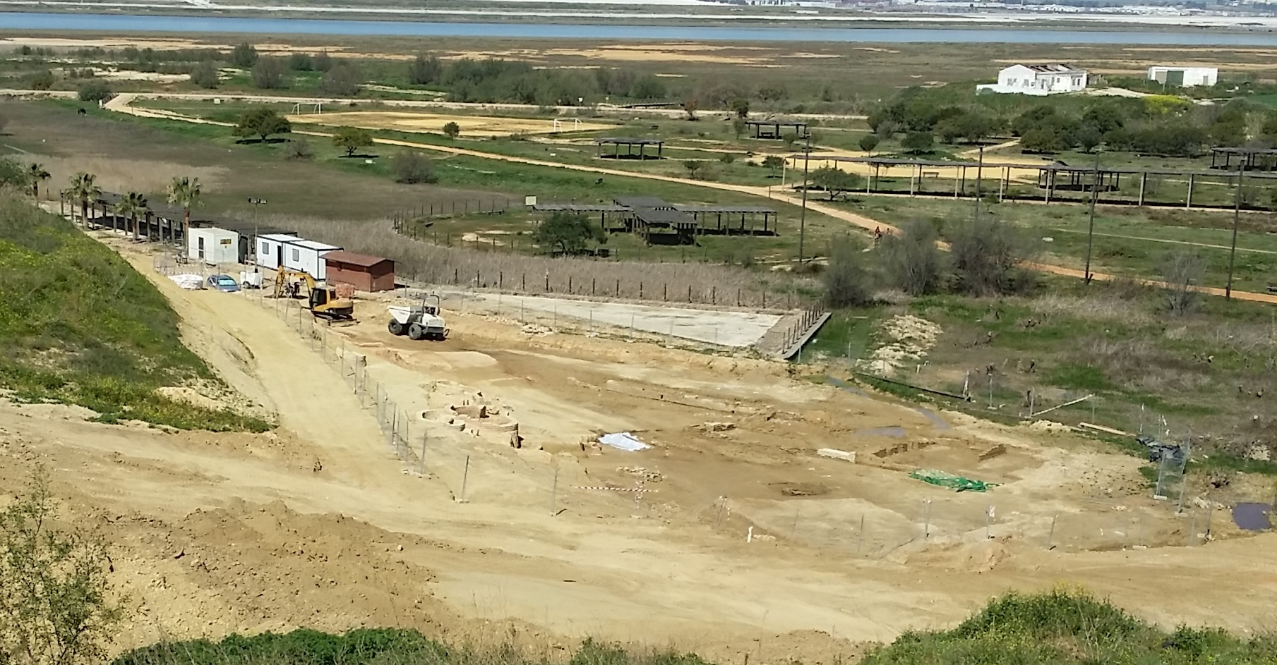 Puerto de Palos. Huelva. España.